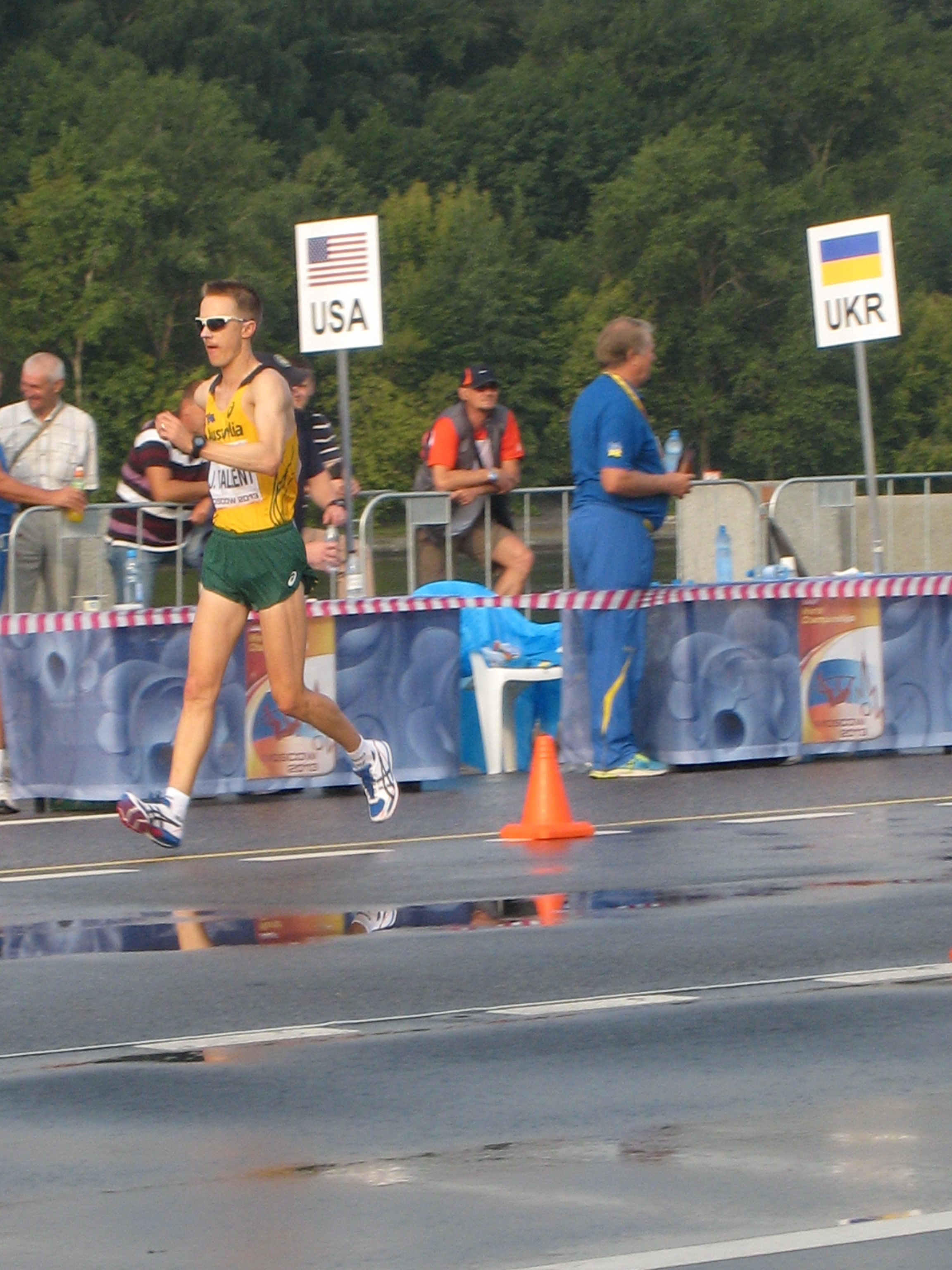 Чемпионат мира по лёгкой атлетике 2013. Ходьба 50 км, мужчины. Австралийский ходок Джаред Таллент